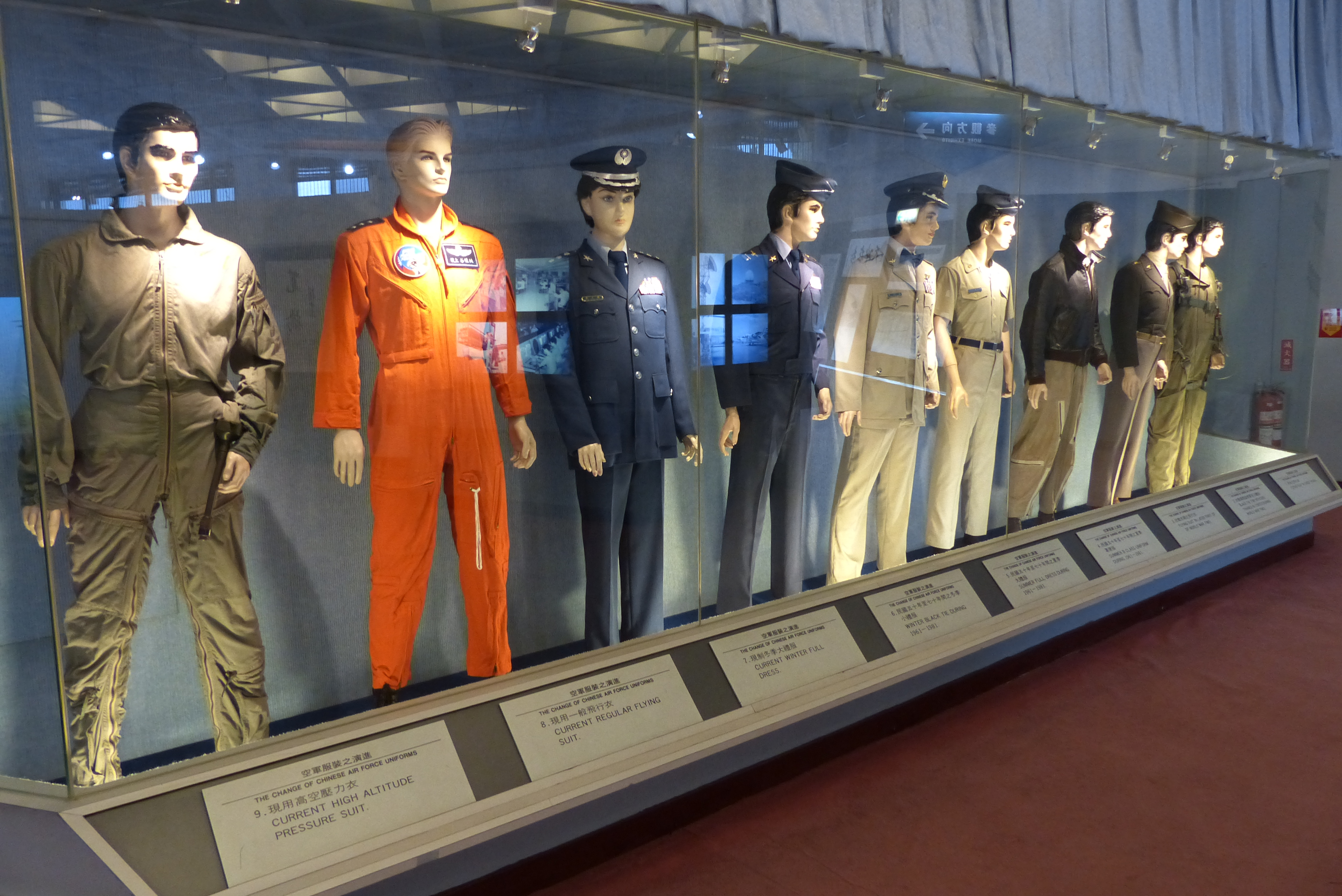 另一側所見航空科學館展示中華民國空軍歷年制服，由右至左：1）早年之飛行衣、2）抗戰期間留美軍官小禮服、3）抗戰末期之飛行衣、4）民國五十年（1961）至七十年（1981）間之夏季軍便服、5）民國五十年（1961）至七十年（1981）間之夏季大禮服、6）民國五十年（1961）至七十年（1981）間之冬季小禮服、7）現制大禮服、8）現制一般飛行衣、9）現用高空壓力衣。